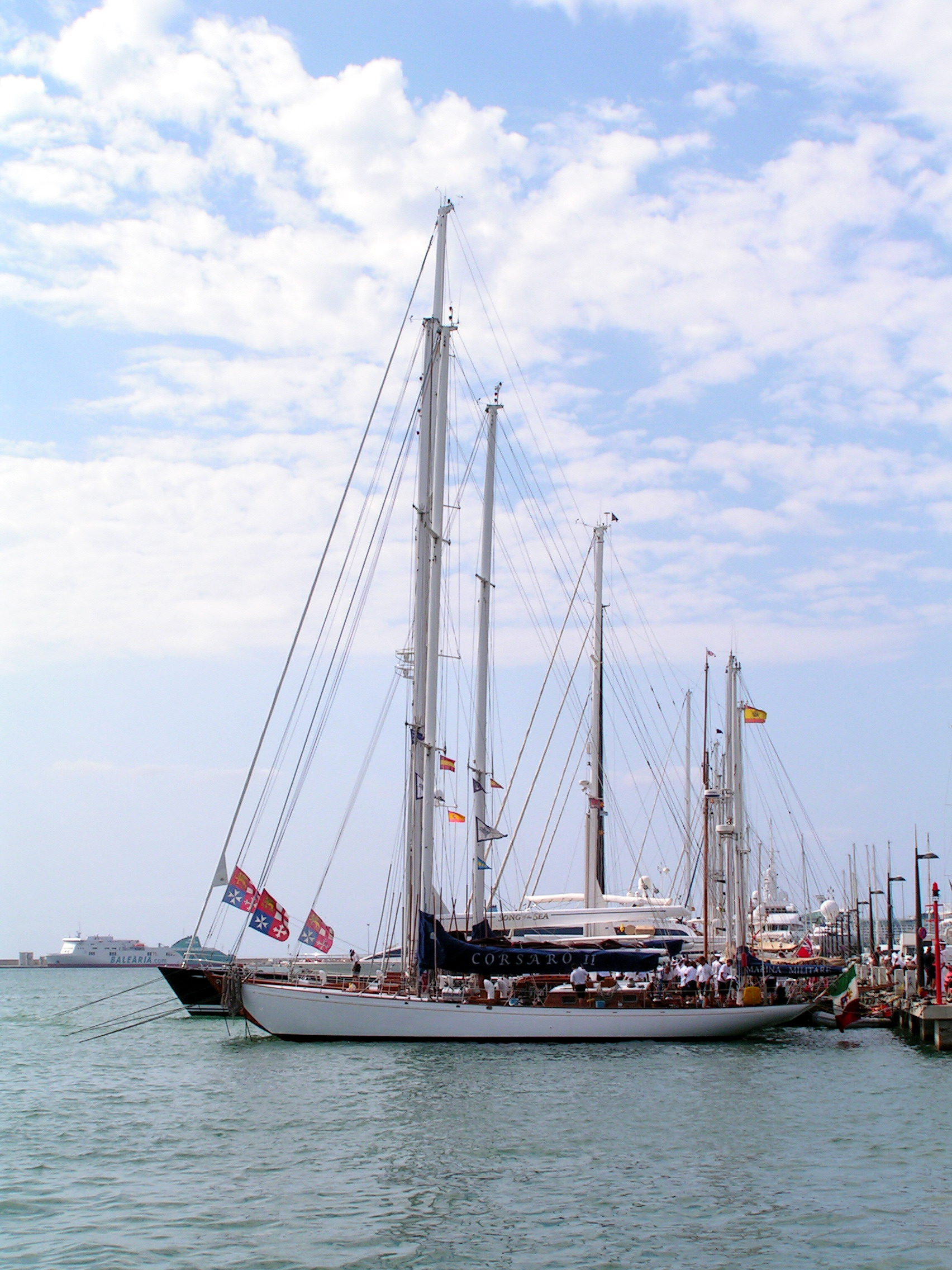 La nave scuola Corsaro II a Palma de Mallorca